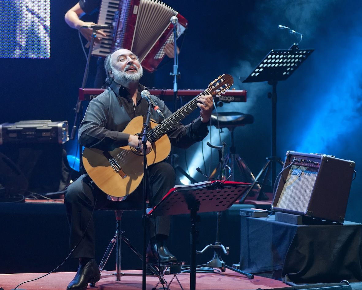 Eduardo Larbanois